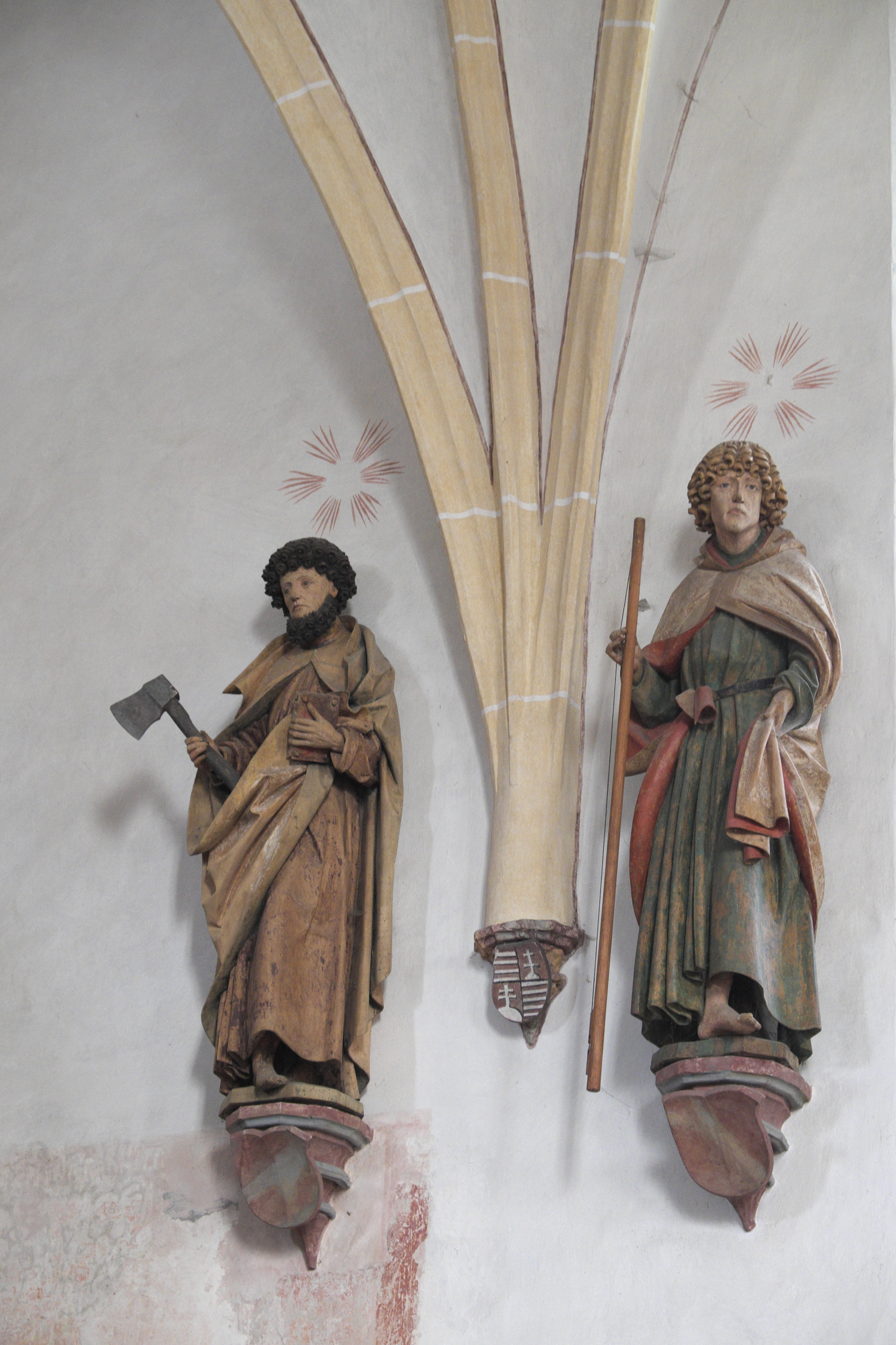 Schlosskapelle Hl. Dreifaltigkeit des Schlosses Blutenburg im Münchner Stadtteil Obermenzing (Bayern), Apostelfiguren von 1490/1500, dem Meister der Blutenburger Apostel zugeschrieben